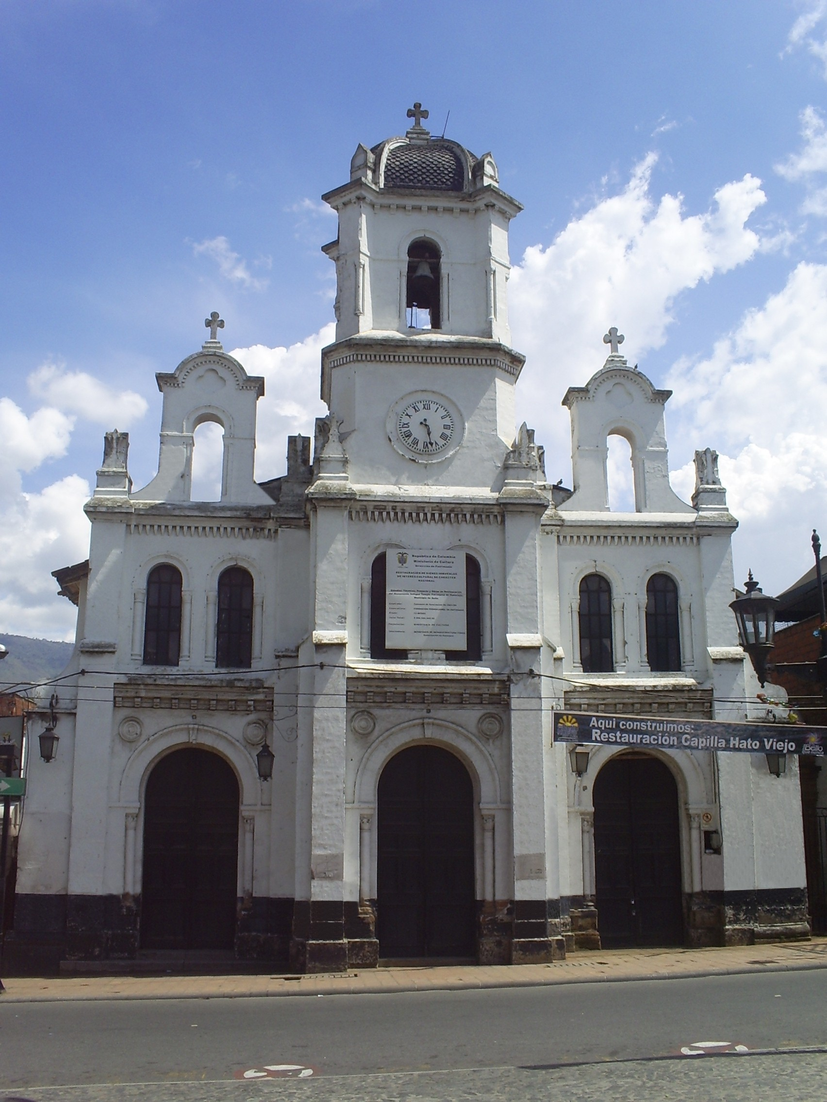 Capilla Hato viejo o Capilla de Nuestra Señora del Rosario. Bello, Colombia.